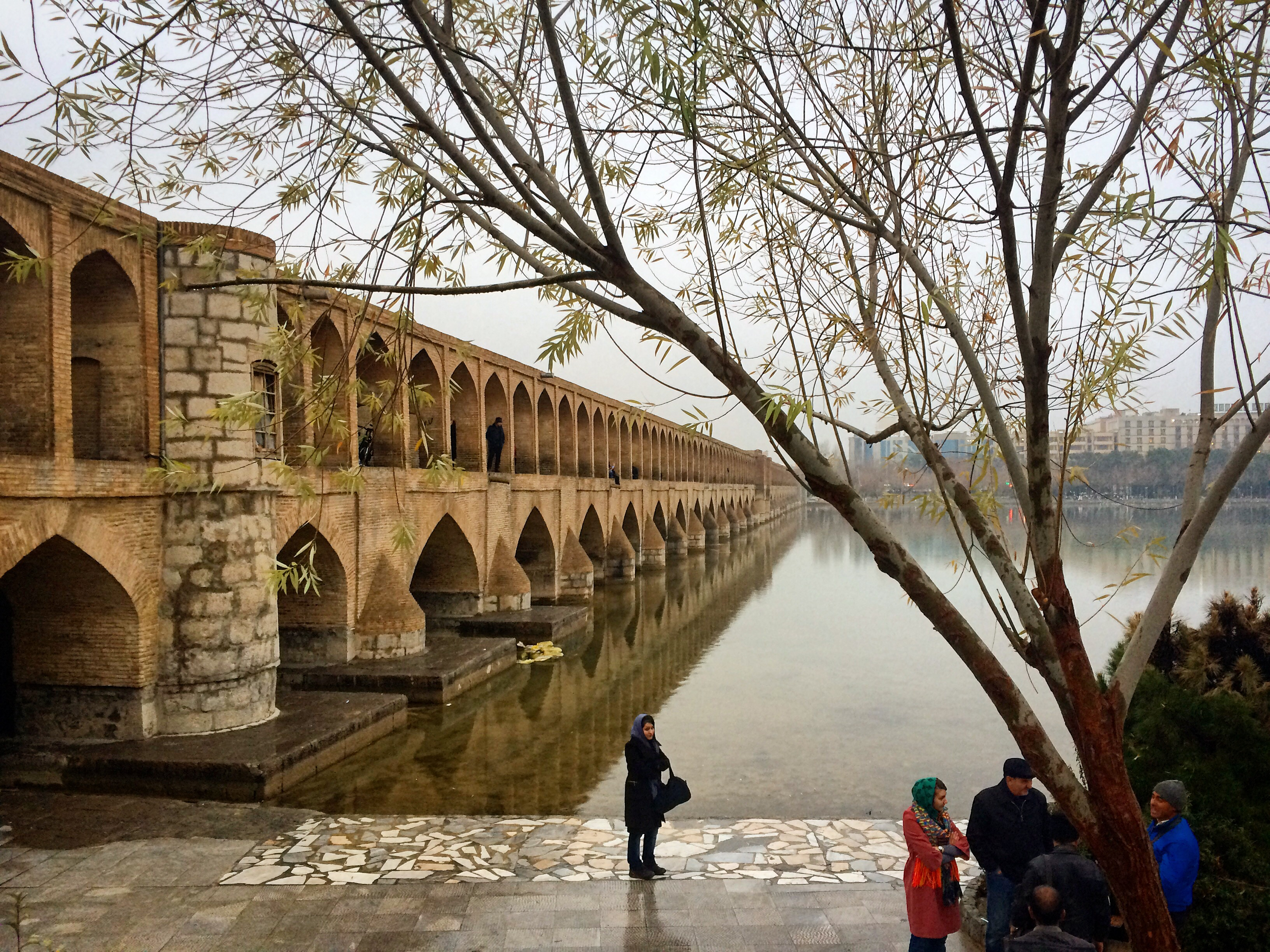 پل الله وردیخان/ سی‌وسه پل/ پل جل